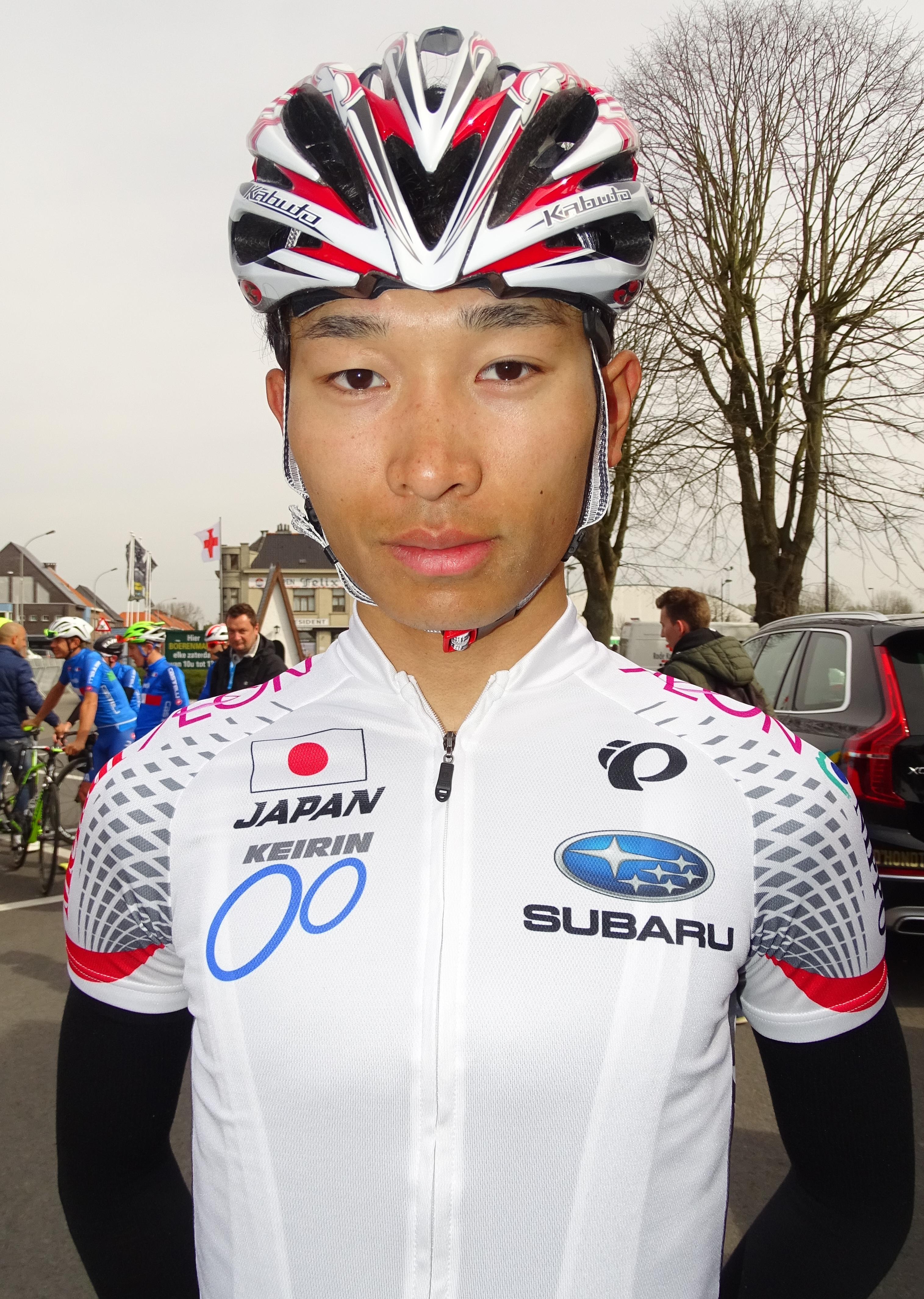 Reportage réalisé le samedi 9 avril à l'occasion du départ et de l'arrivée du Tour des Flandres espoirs 2016 à Audenarde, Belgique.